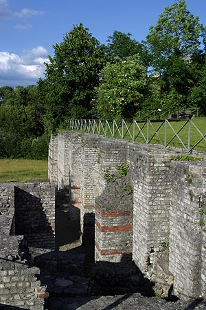 Augusta Raurica (Augst): Basilica